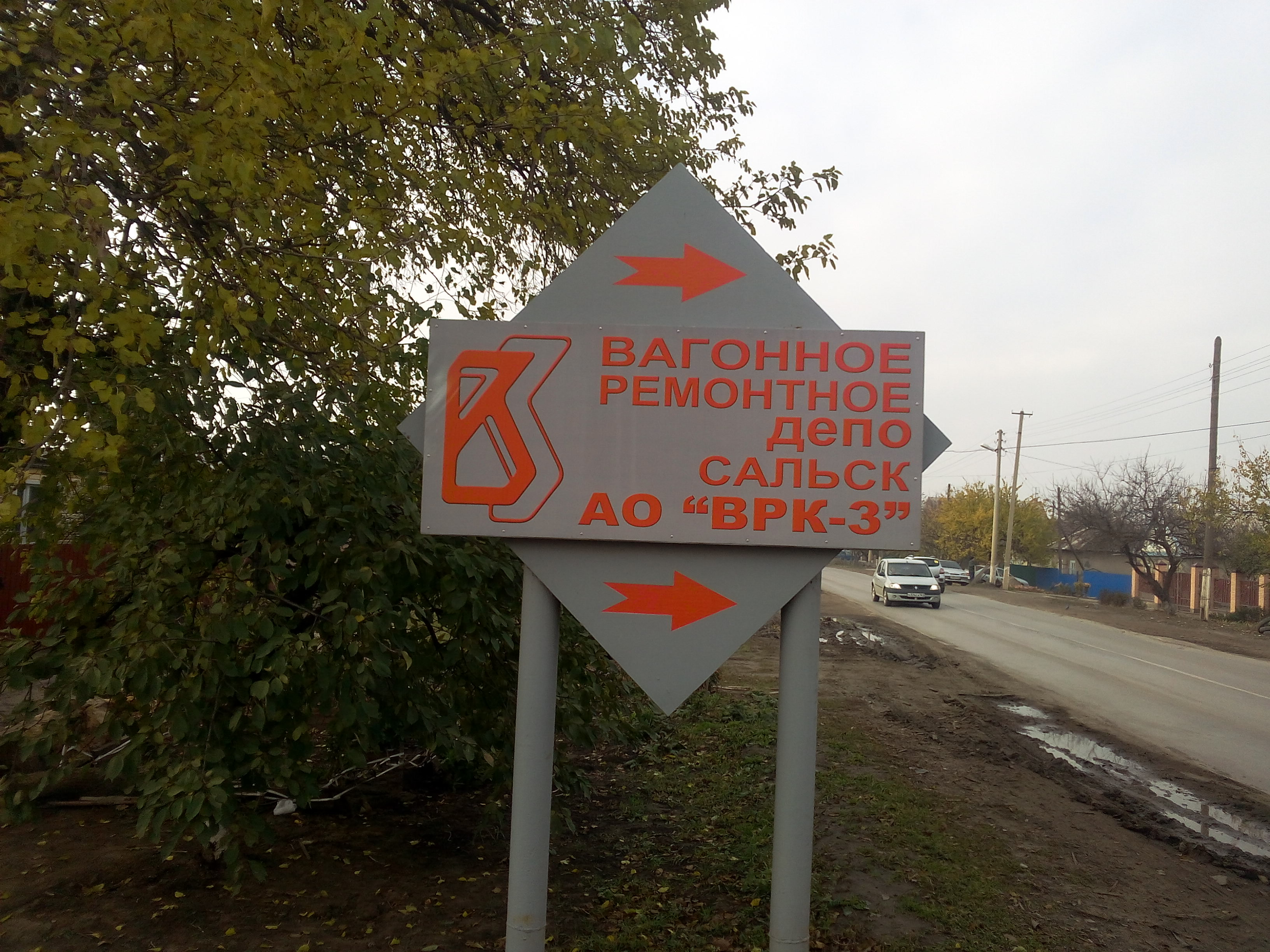 г. Сальск, ул. Фрунзе, указатель "Вагонное ремонтное депо"